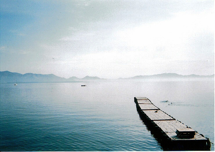 Lake